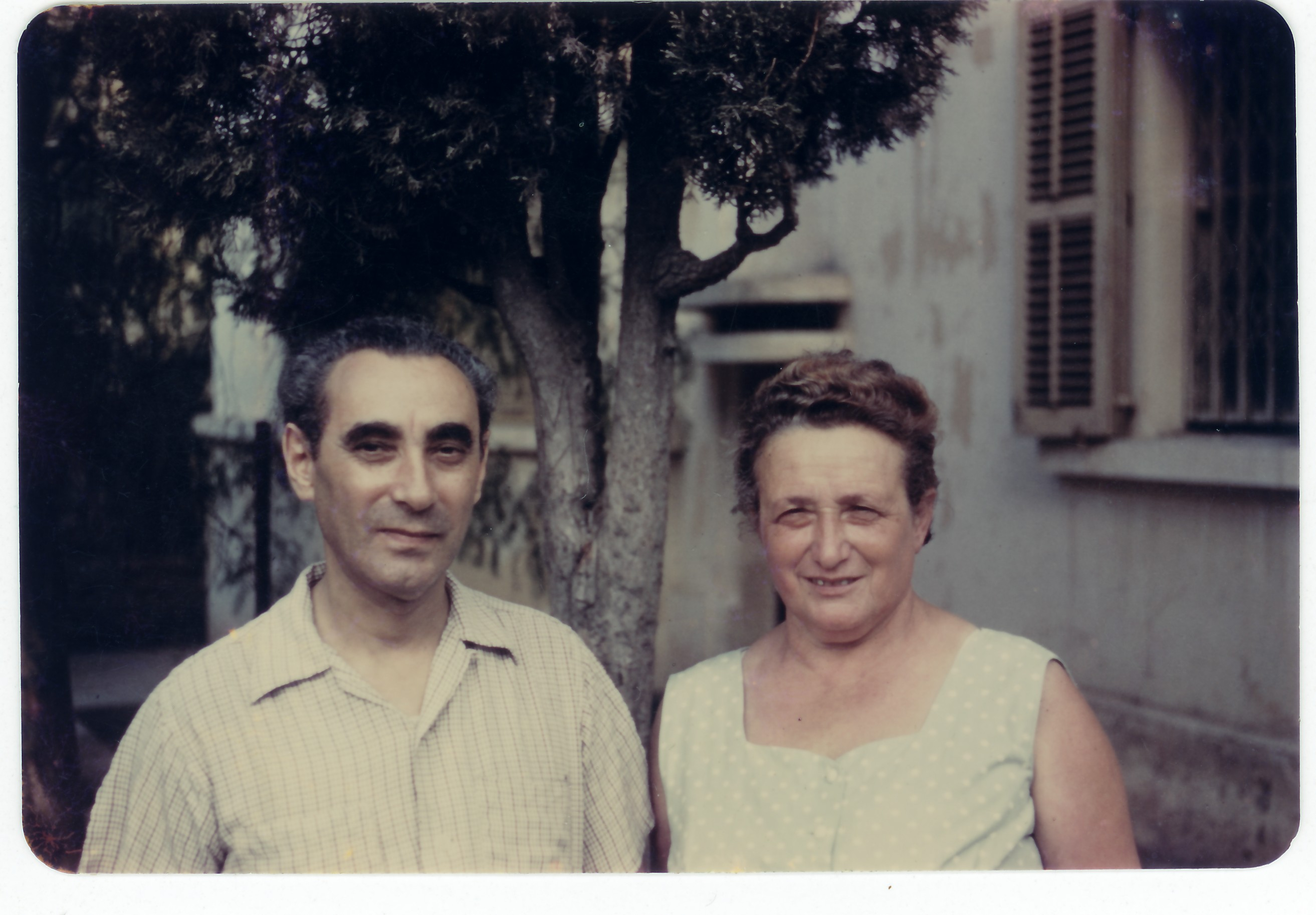 משה וטובה בר-דוד